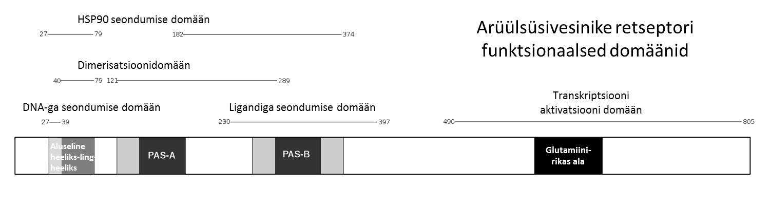 AHR-i funktsionaalsed domäänid